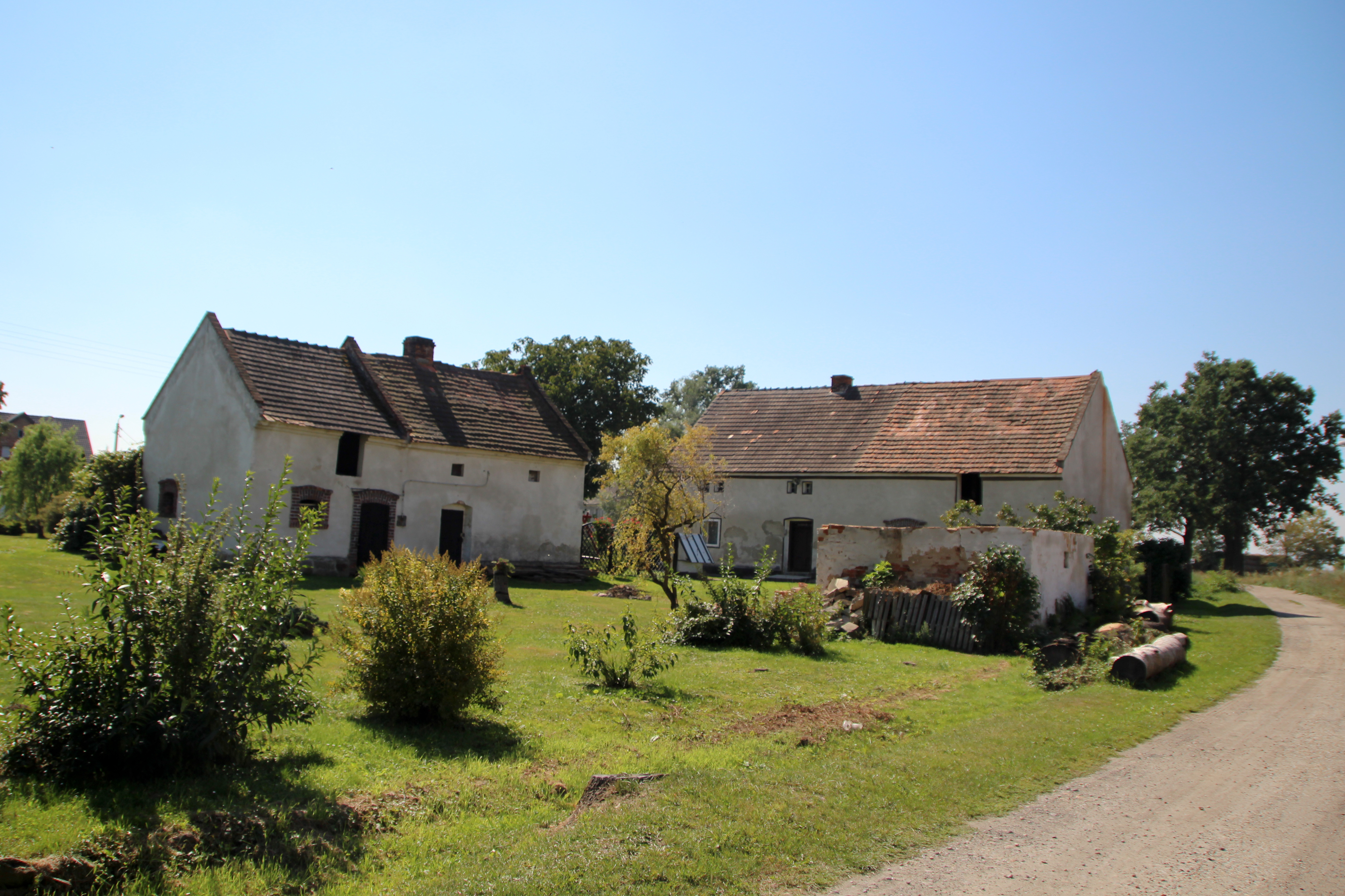 Kwiatków – wieś w Polsce położona w województwie opolskim, w powiecie nyskim, w gminie Otmuchów.